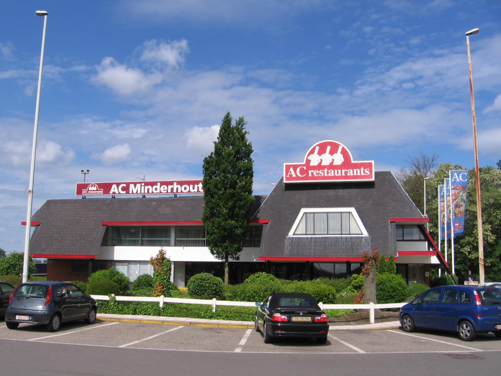 AC Restaurants